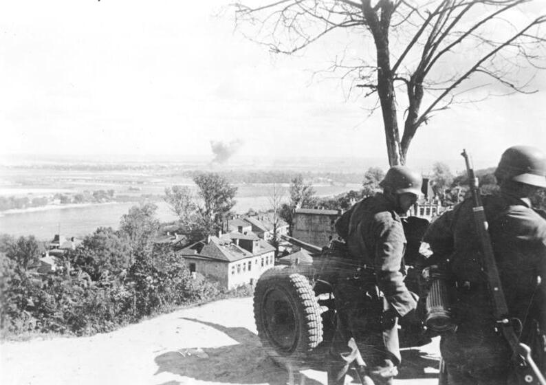 Zentralbild II.Weltkrieg 1939-1945 An der Front in der Sowjetunion. Die Eroberung von Kiew am 20.9.1941 durch die faschistische deutsche Wehrmacht. Deutsches Pak-Geschütz in Feuerstellung auf der Höhe der Zitadelle von Kiew. 8702-41